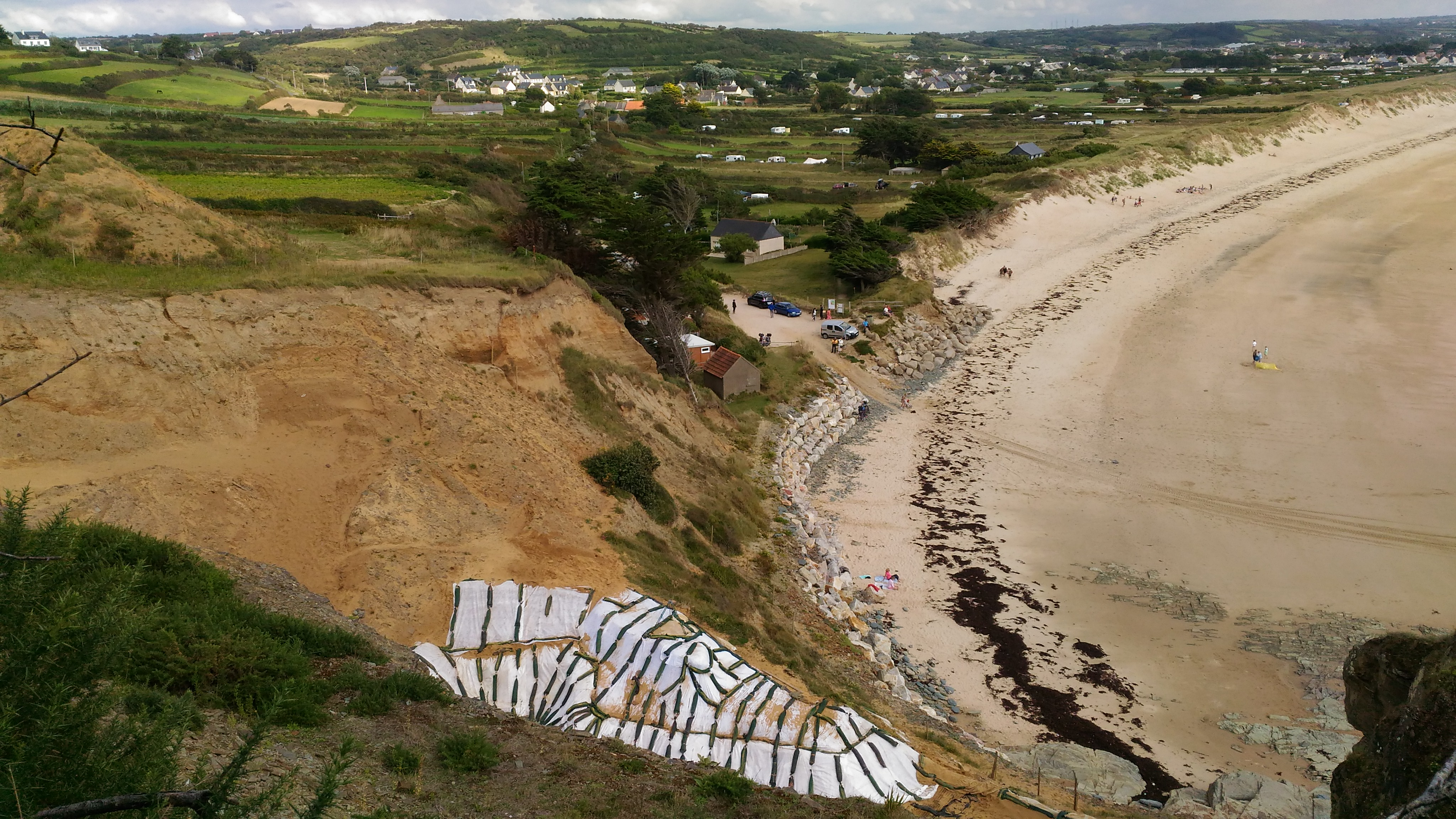 Plage et site archéologique du Rozel #100WikiCommonsDays session 2 jour 14